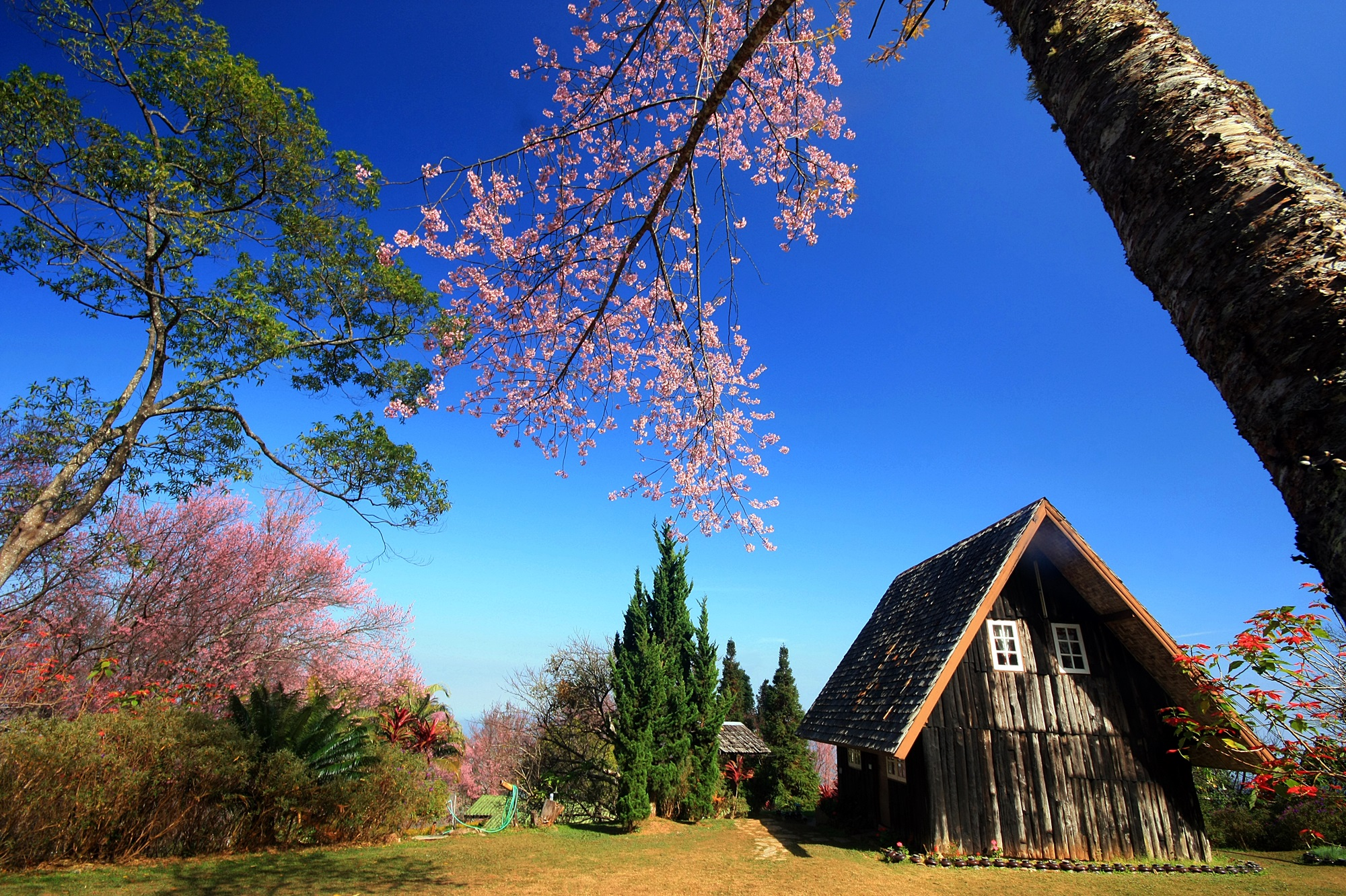 อุทยานแห่งชาติขุนสถาน จังหวัดน่าน